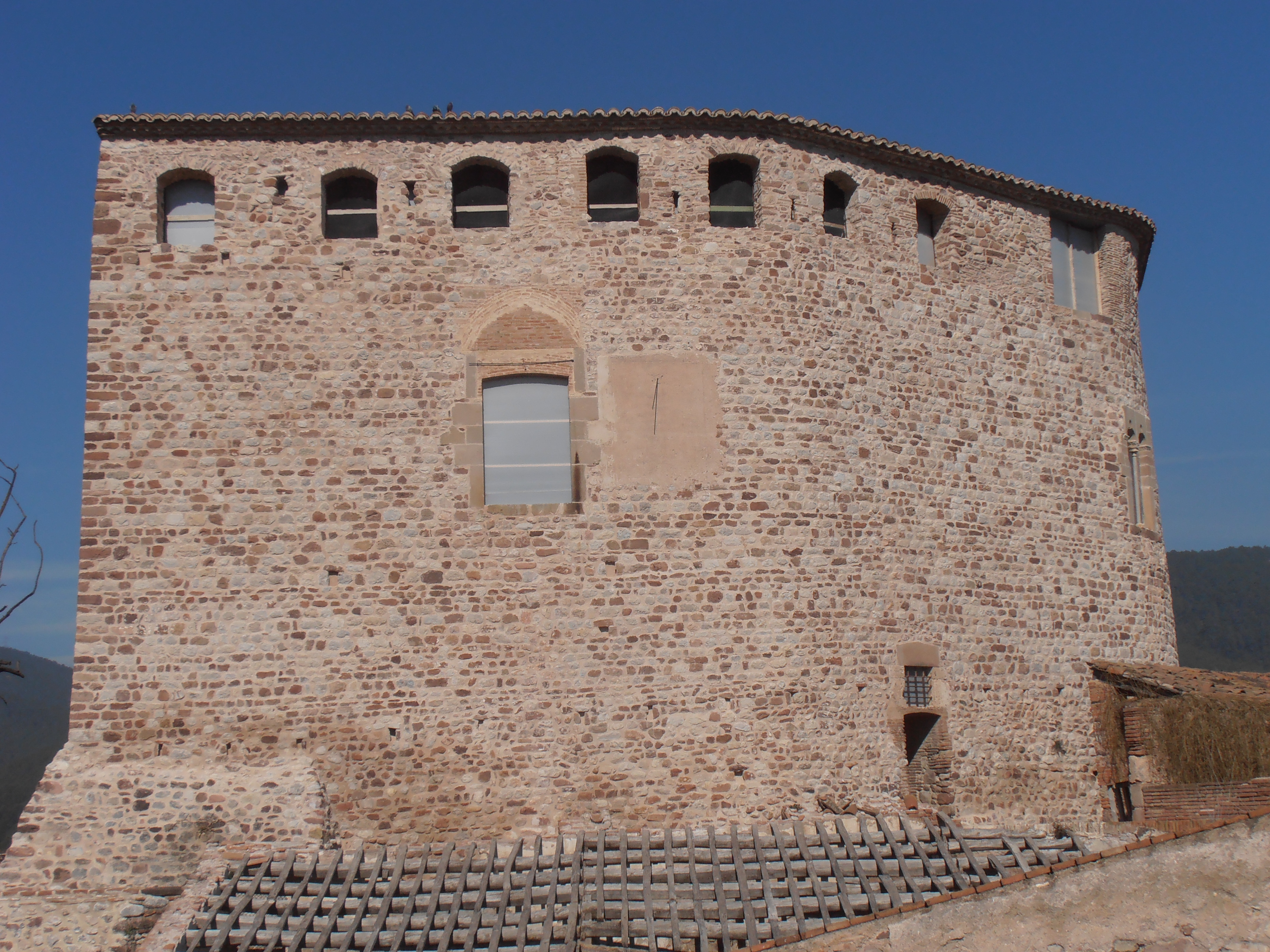 Façana Sud del Castell de Sentmenat